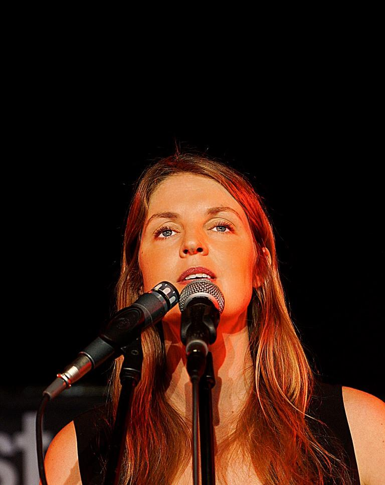 Lauren Kinsella au Festival de Jazz de Manchester 2016